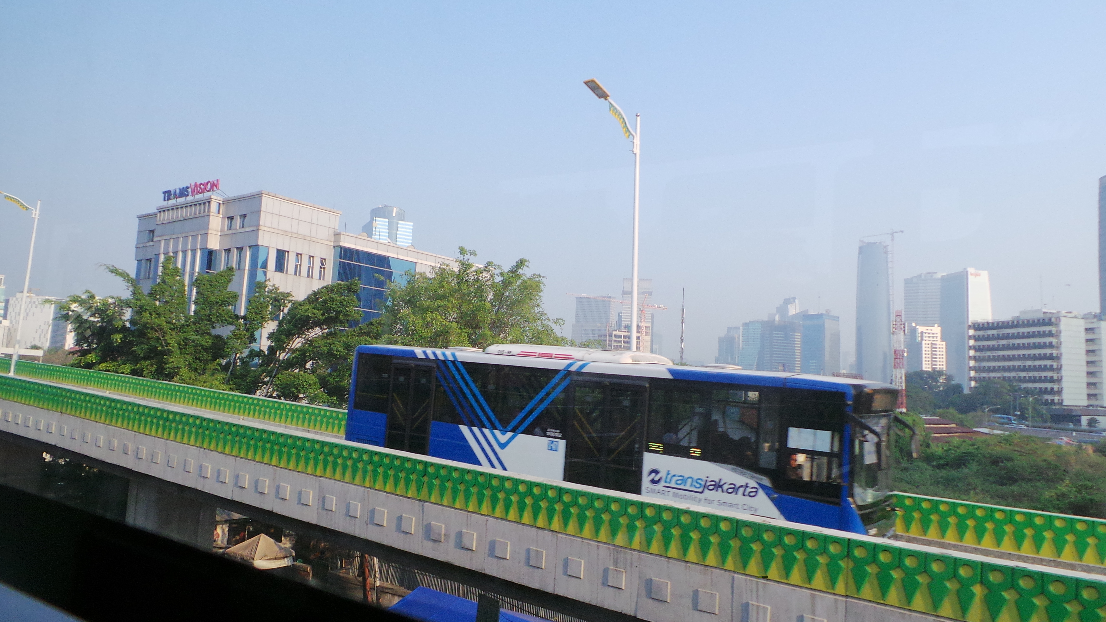 Gigi Balang adalah ornamen khas Betawi yang turut menghiasi koridor layang Trans Jakarta. Seperti gigi belalang yang berbaris rapih melambangkan bahwa hidup harus selalu jujur, rajin, ulet dan sabar. Seperti belalang bisa mematahkan kayu jika dikerjakan secara terus menerus dalam waktu yang lama namun secara keseluruhan bisa bermakna ‘pertahanan yang kuat’.